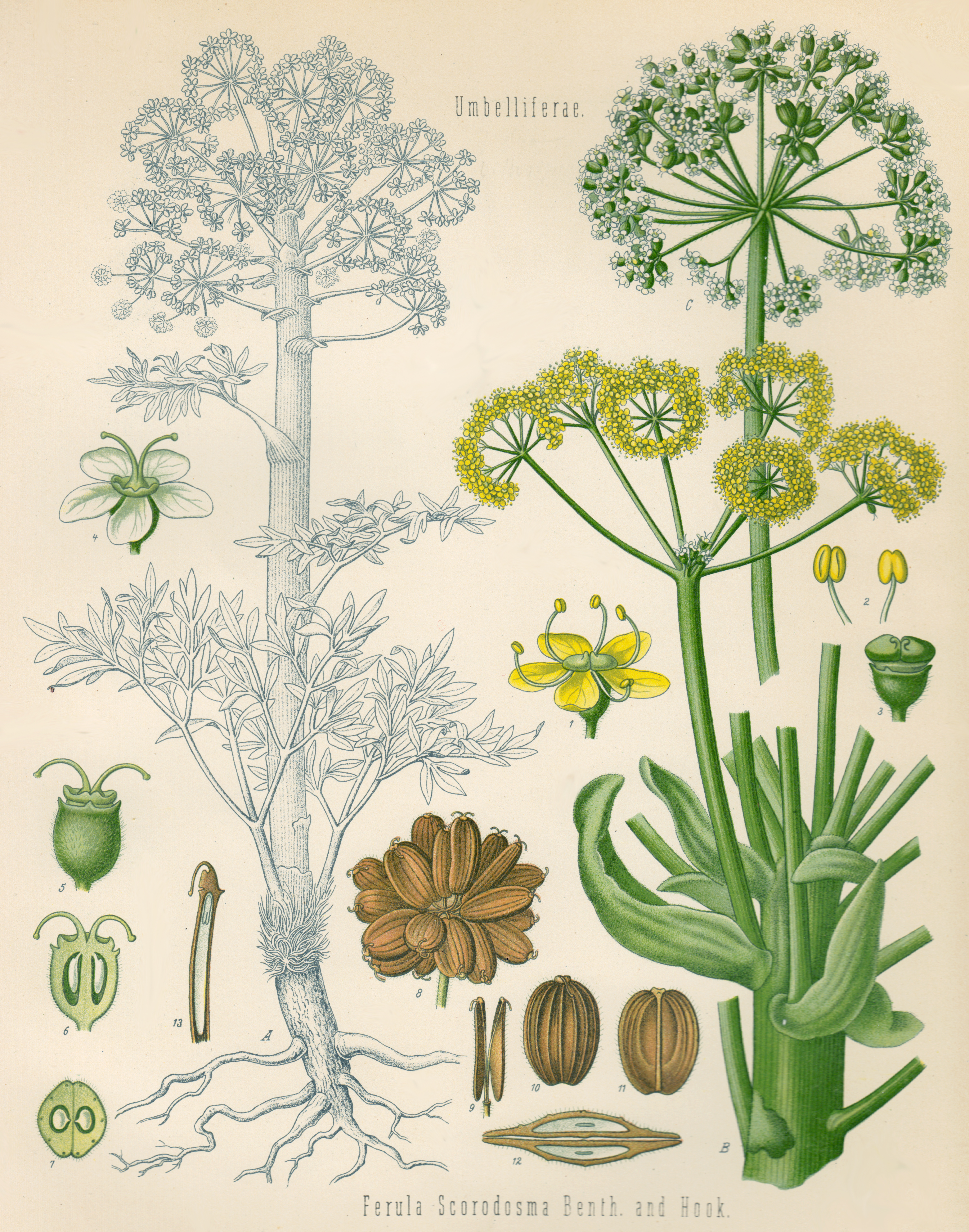 Abbildung von Ferula assa-foetida